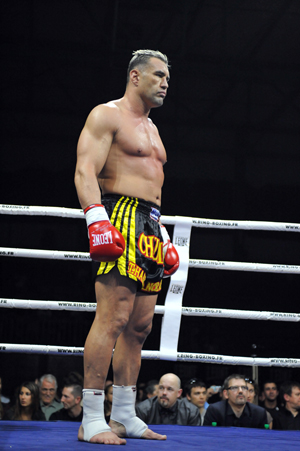 Jérôme Le Banner remettait pour la seconde fois en jeu sa ceinture mondiale WKN (kickboxing rules, 5x2 min.) face au lituanien Arnold Oborotov. Un combat serré et disputé, soldé par un match nul, qui voit ainsi Jérôme Le Banner conserver son titre de Champion du Monde.